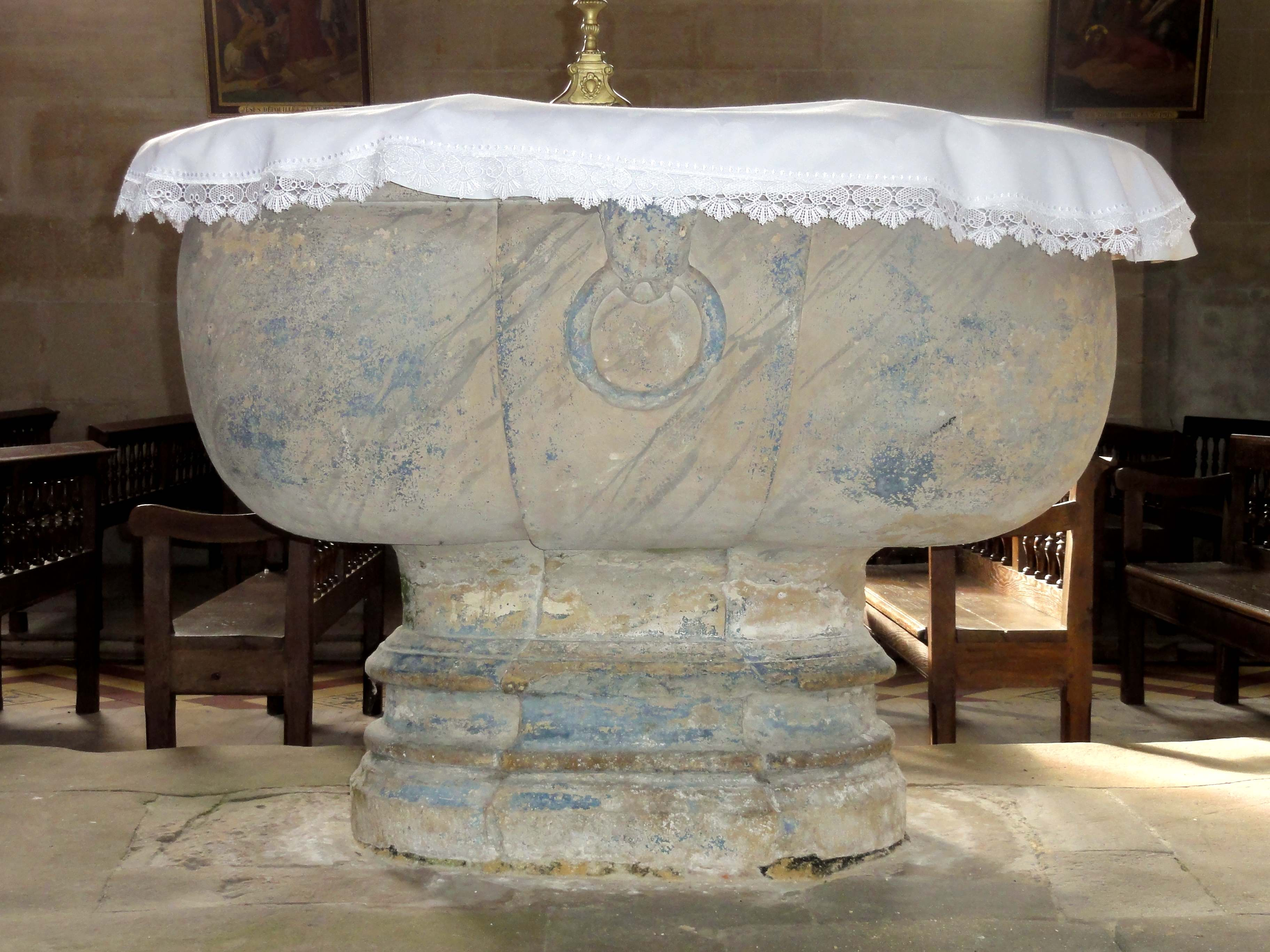 Les fonts baptismaux du XVIe siècle.